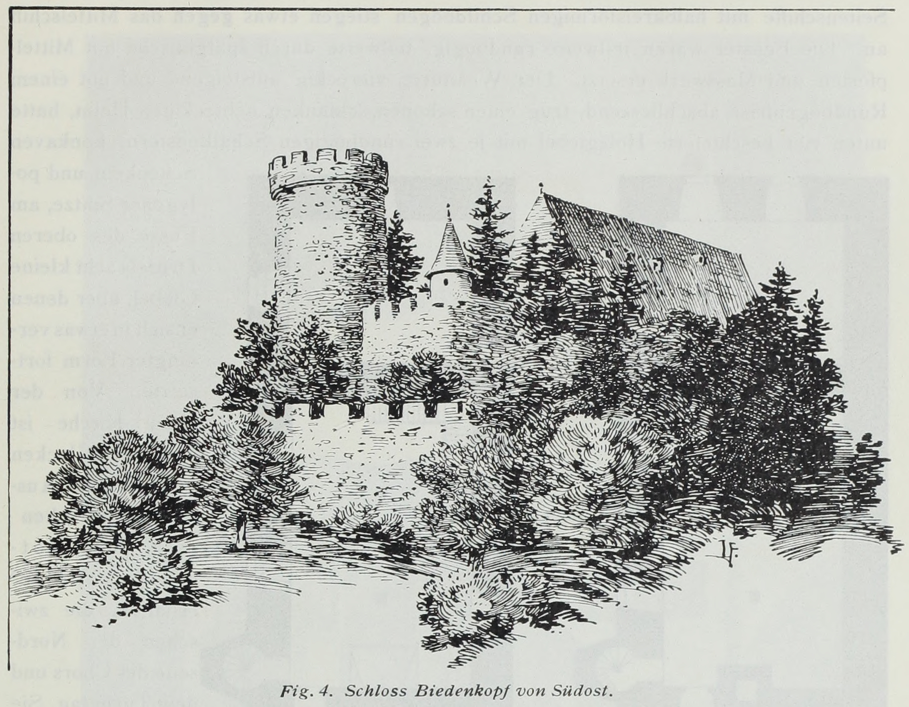 Schloss Biedenkopf von Südost